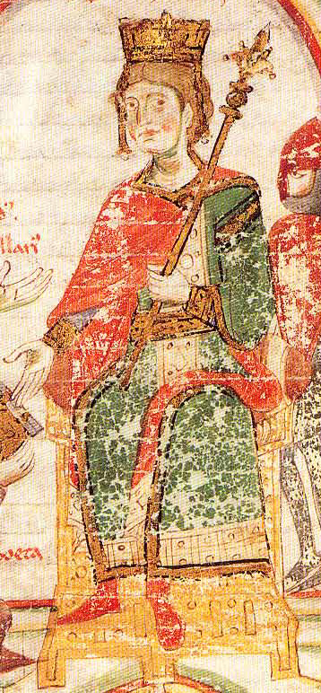 Jindřich VI. Štaufský